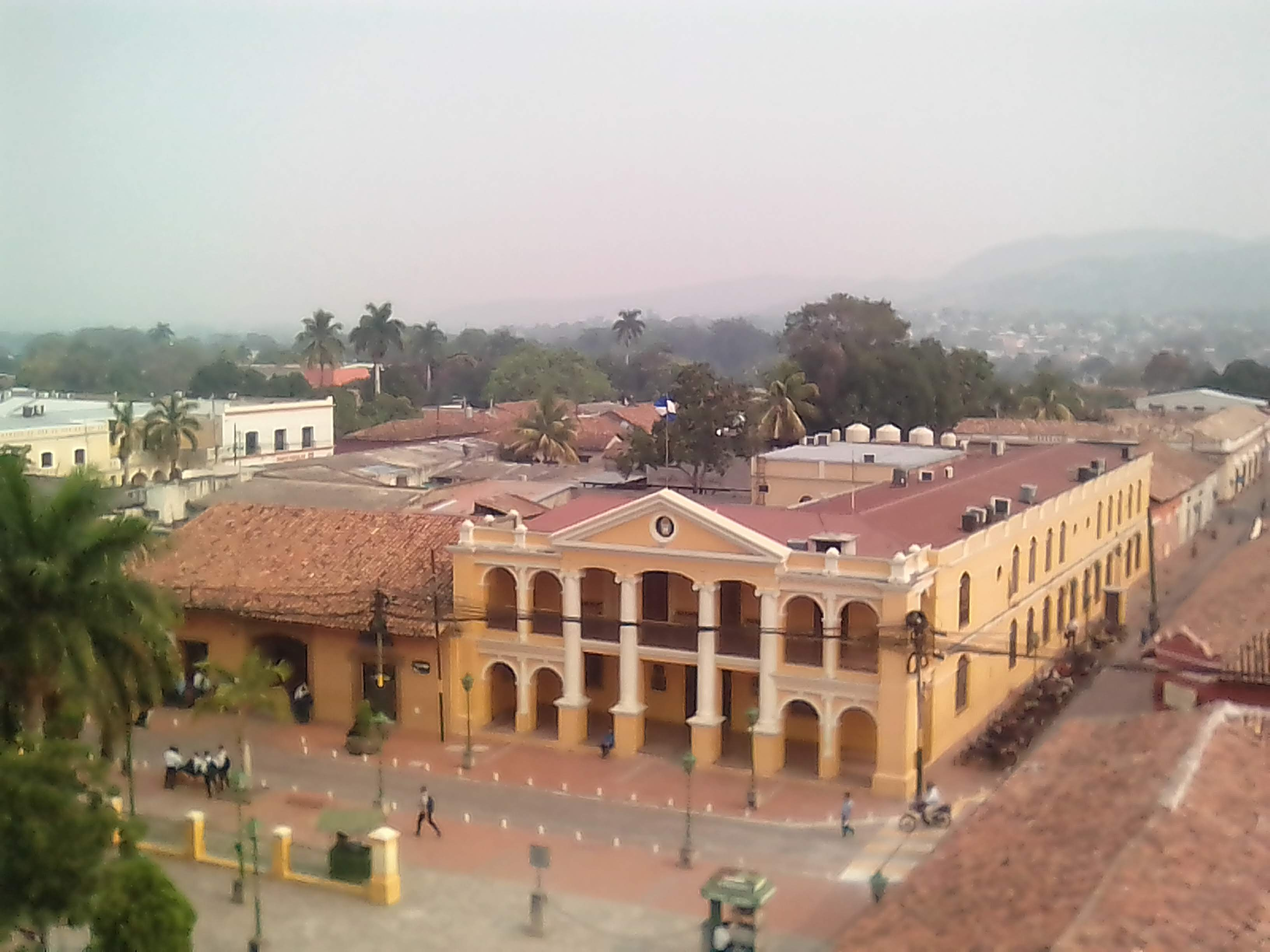 Palacio gubernamental de comayagua visto desde la catedral